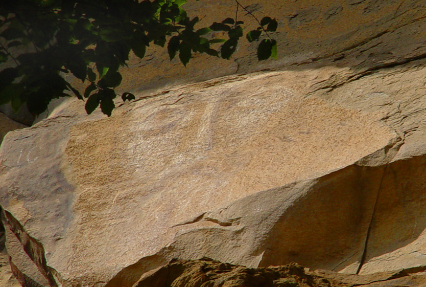 Лик Христа. Нижне-Архызский историко-архитектурный и археологический комплекс. Карачаево-Черкессия. Музей-заповедник